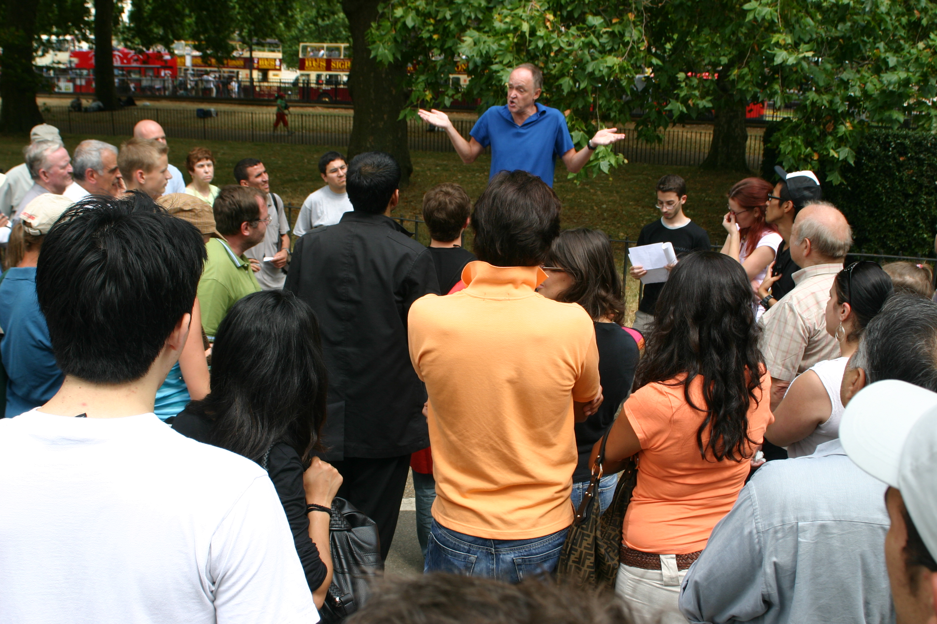 Speaker's Corner, Hyde Park, London